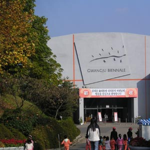 광주비엔날 메인홀